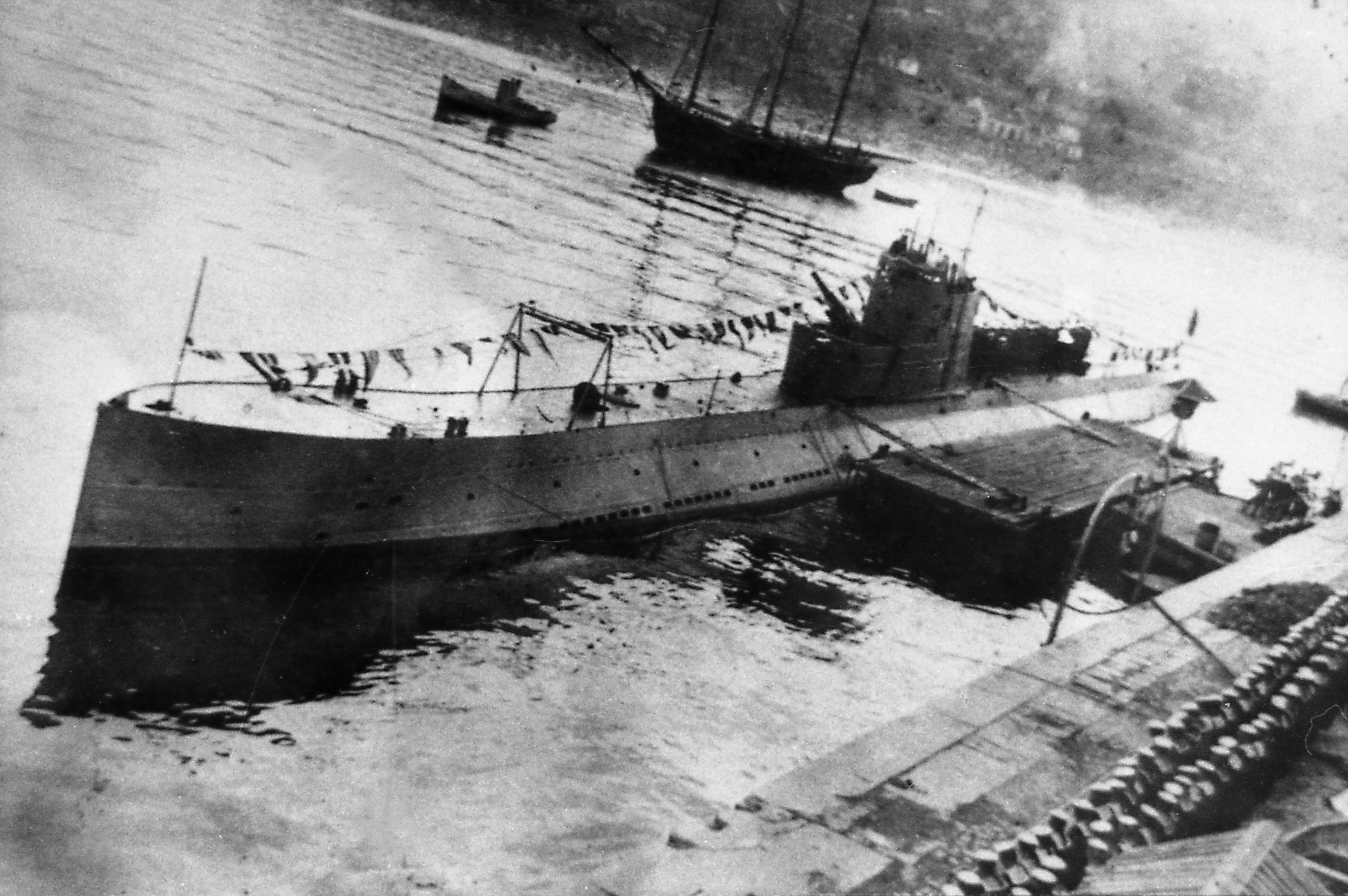 Советская подводная лодка Л-4 "Гарибальдиец"